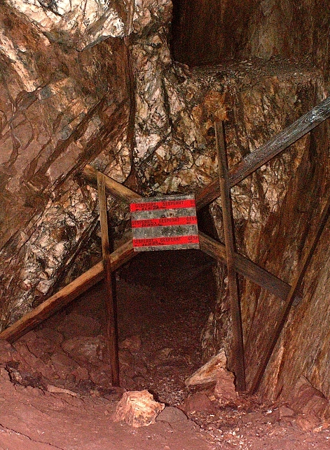 Bergwerk Hallwangen, gesperrter Stollen